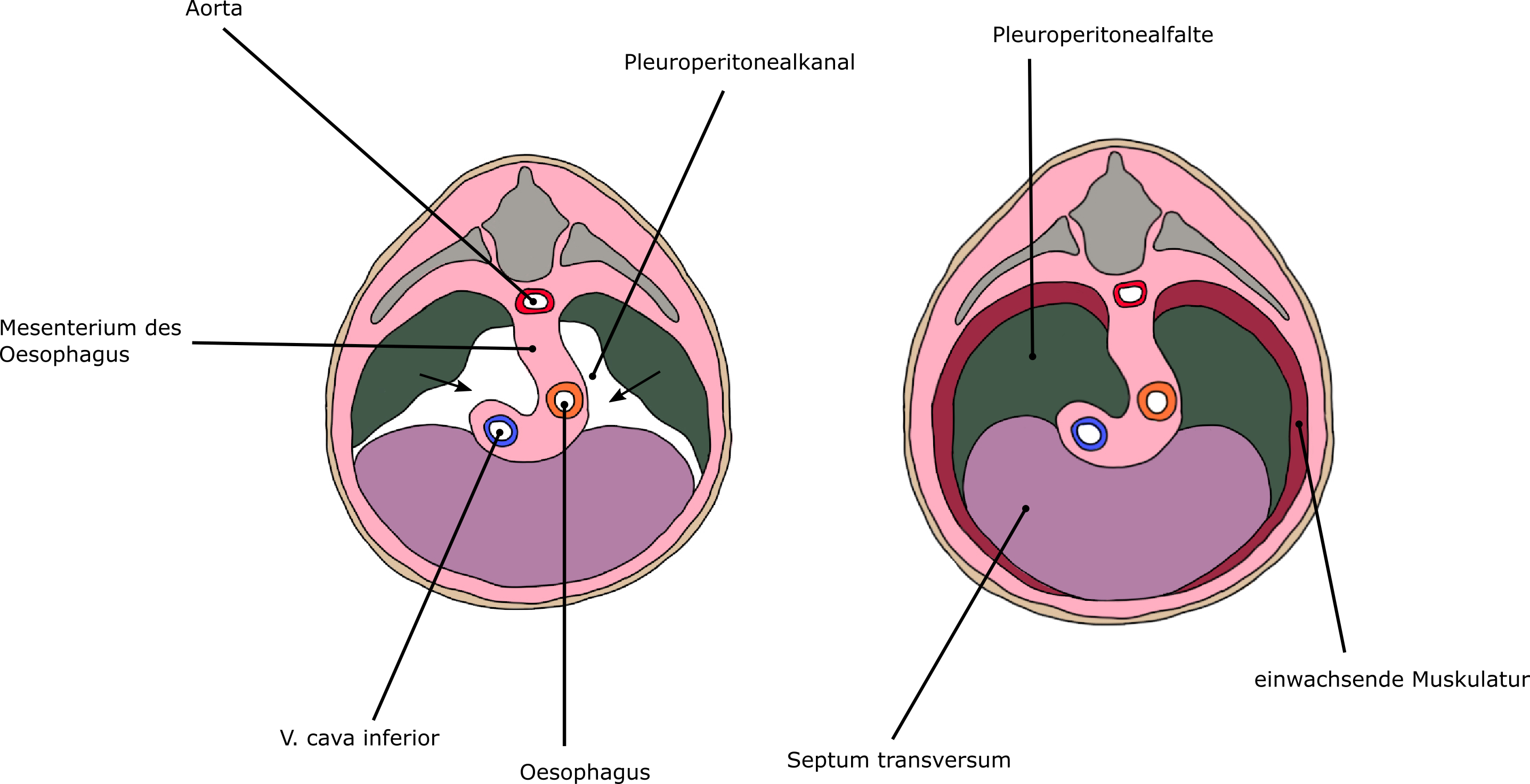 Embryonalentwicklung des Zwerchfells